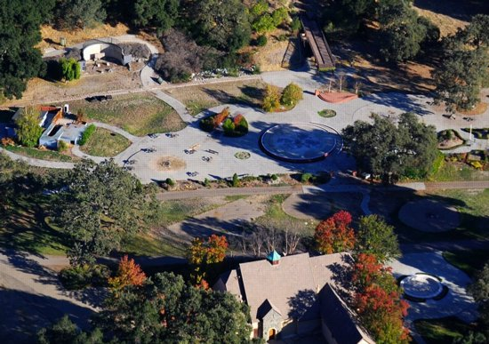 Aerial:Neverland rides gone